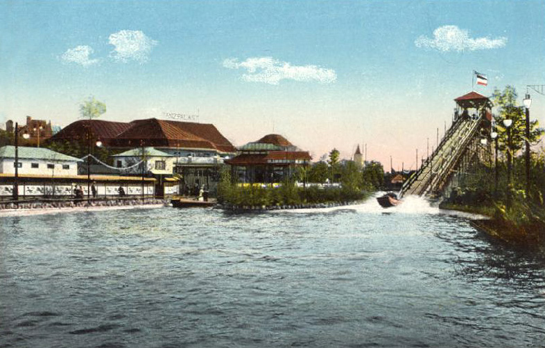 Internationale Baufach-Ausstellung 1913 Leipzig, Wasserrutsche und Tanzpalast im Erholungspark